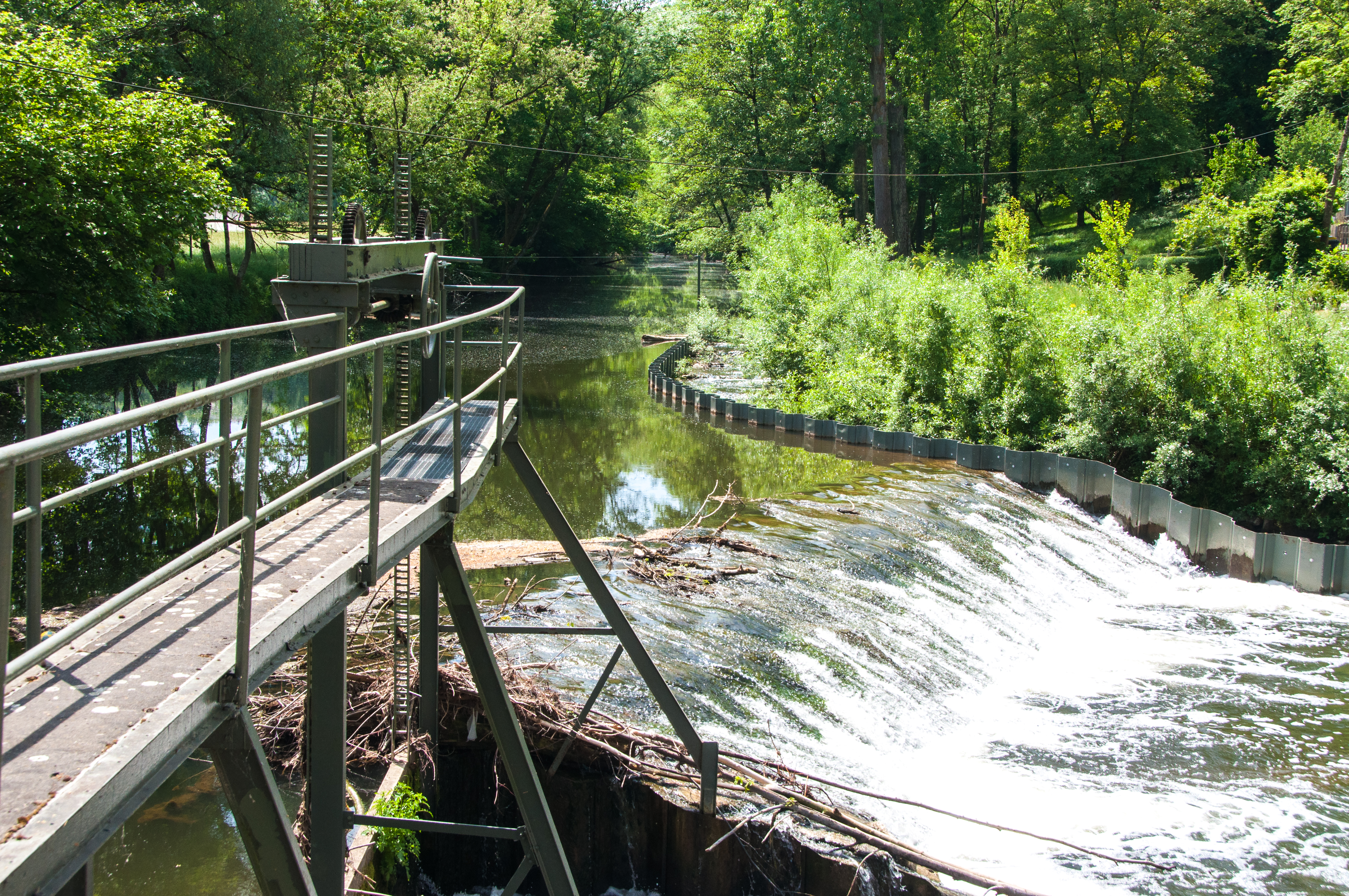 LSG 1.19.012 Unteres Remstal und Randgebiete Die Staustufe macht den Mühlenbetrieb erst möglich.